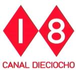 Carta de ajuste del Canal 18.